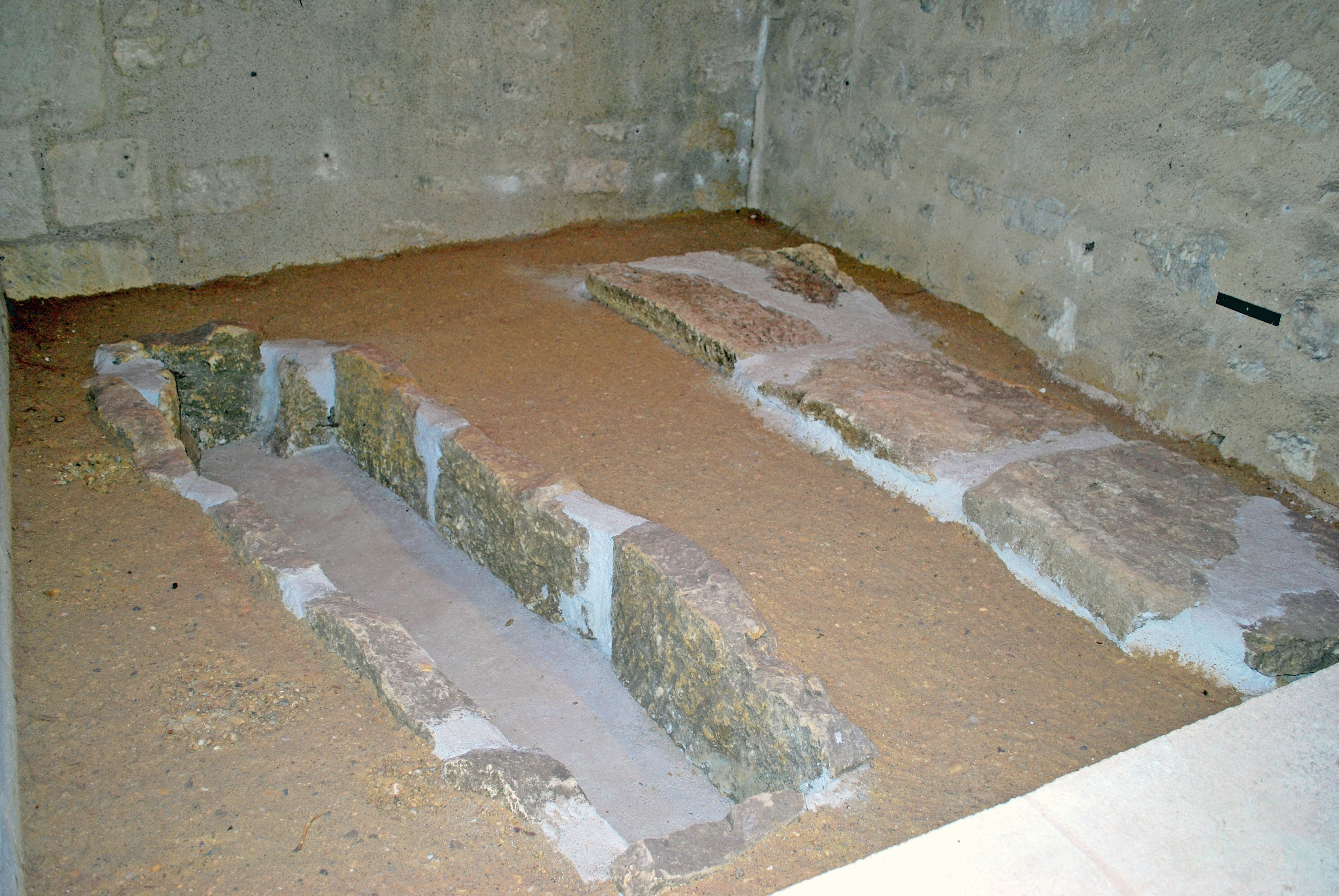 Villenave d'Ornon église St Martin